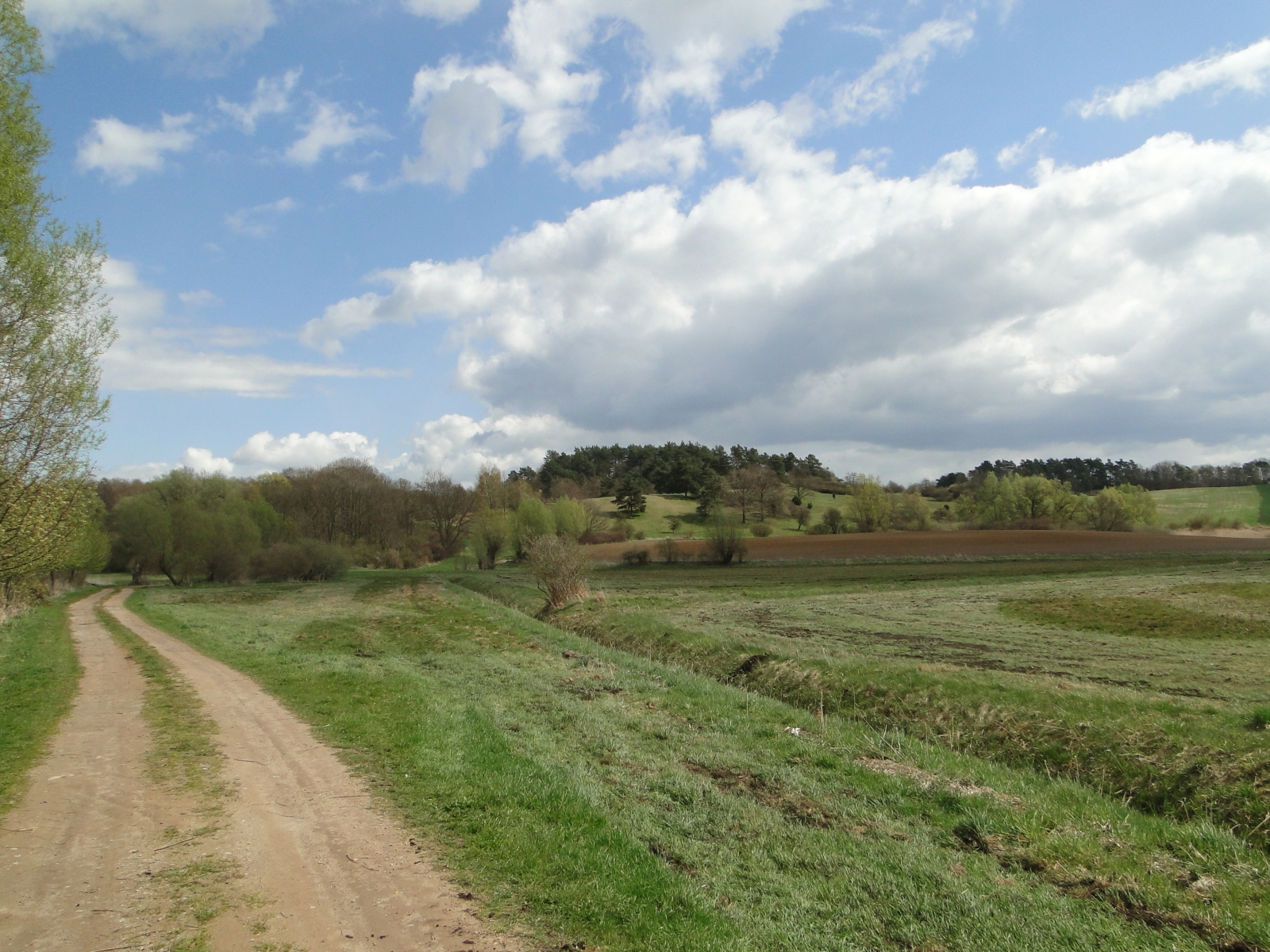 Hellberge bei Neubrandenburg, Mecklenburg-Vorpommern. Naturschutzgebiet.